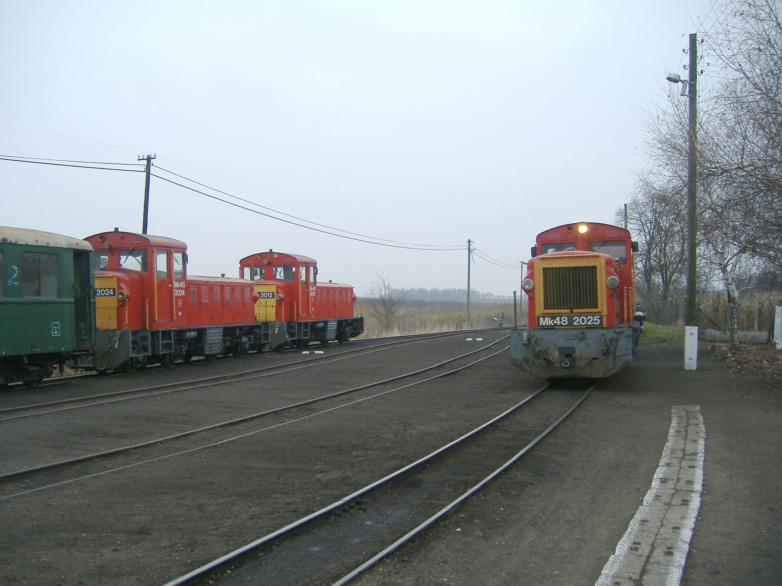 A Nyíridéki Kisvasút Herminatanya állomása